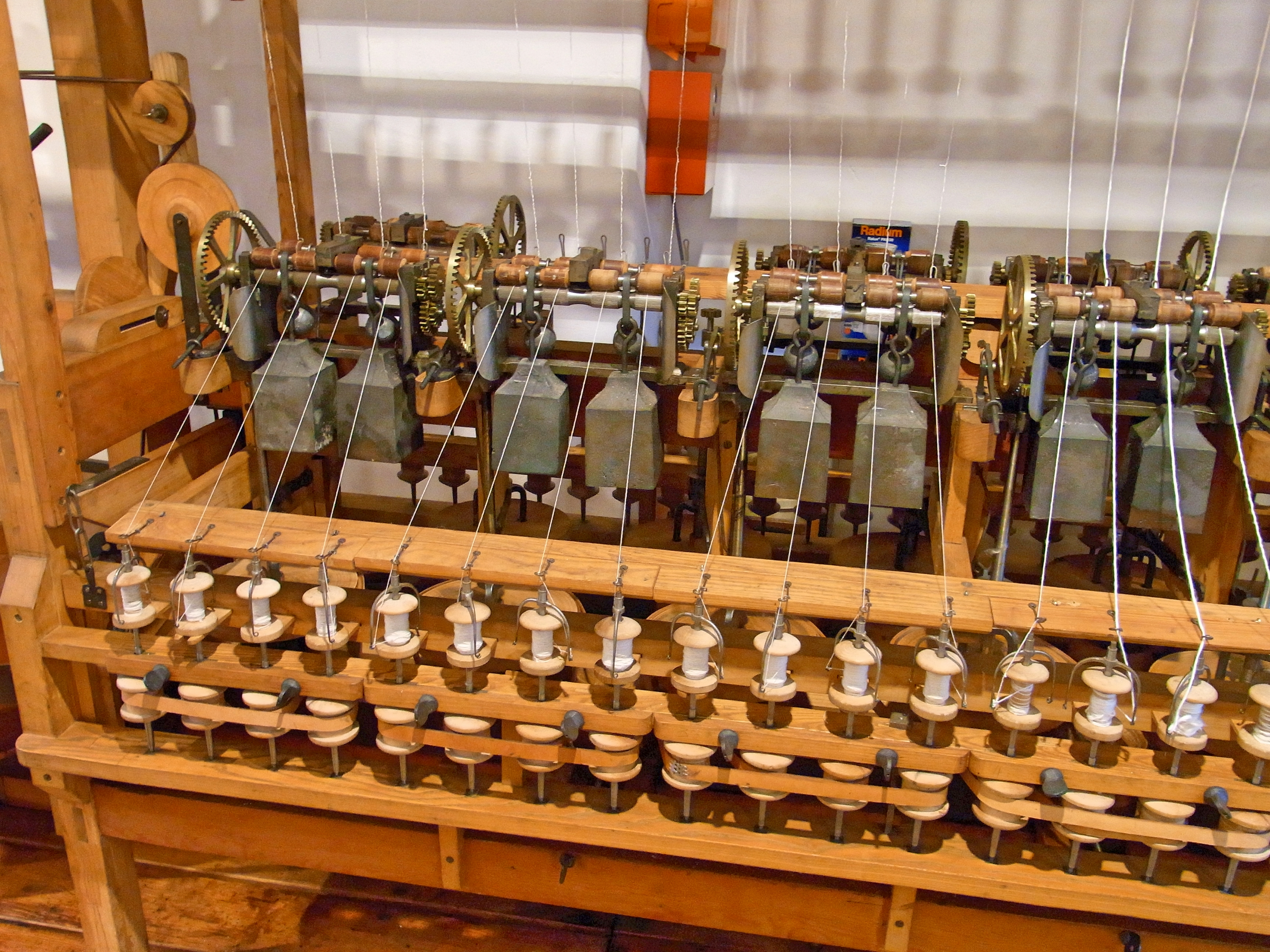 LVR-Industriemuseum, Textilfabrik Cromford: Reproduktion einer Spinning Jenny